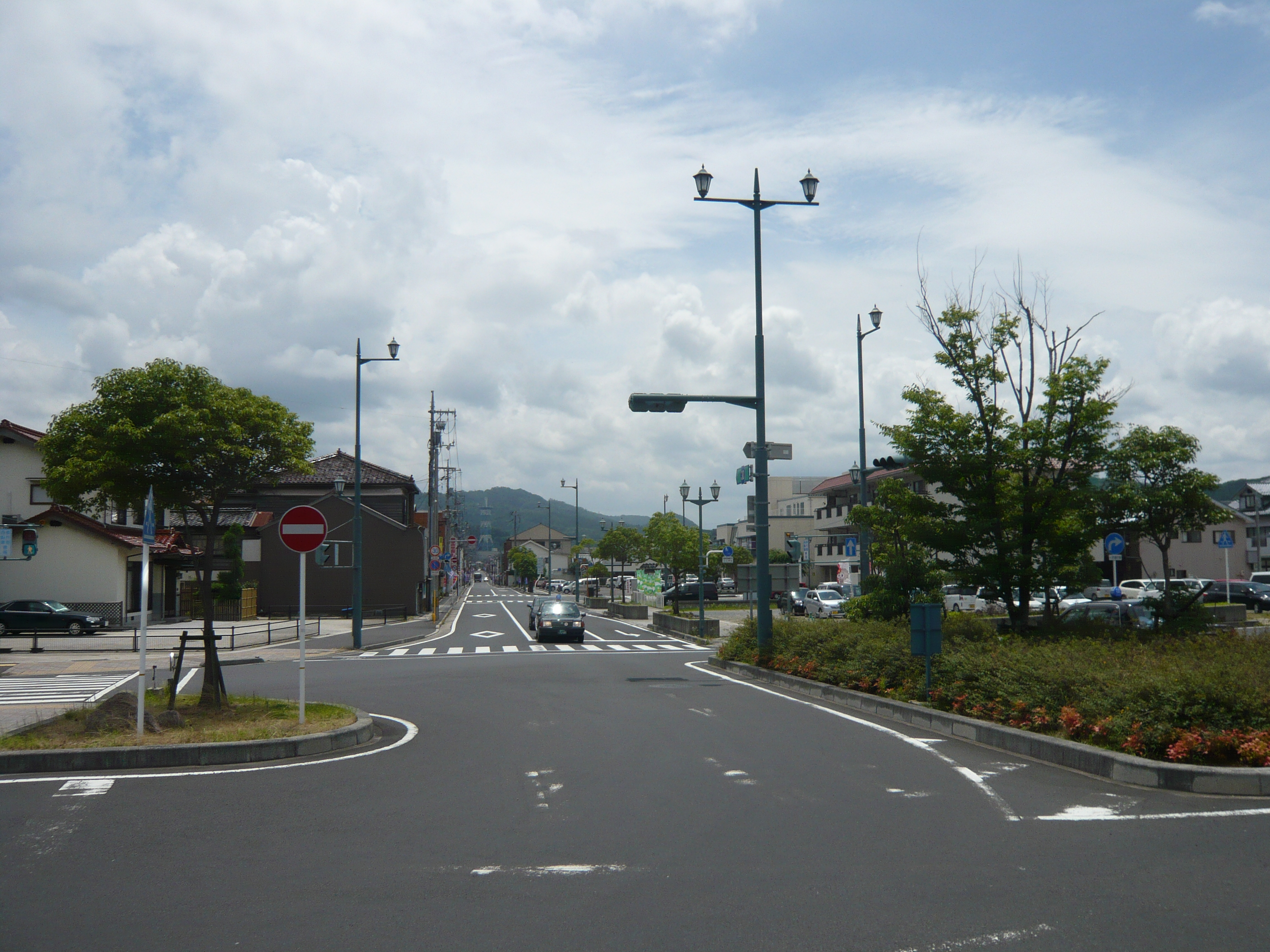 大田市駅前。島根県道30号および県道174号（174号は起点）